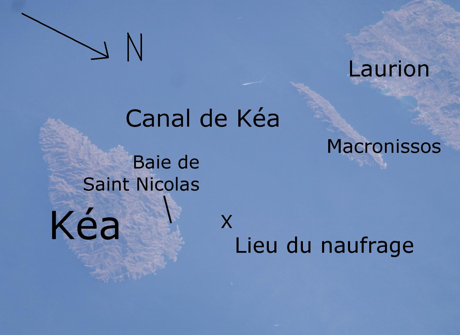 Photographie de Kéa et Makronissos depuis la Station Spatiale Internationale - Résolution supérieure.